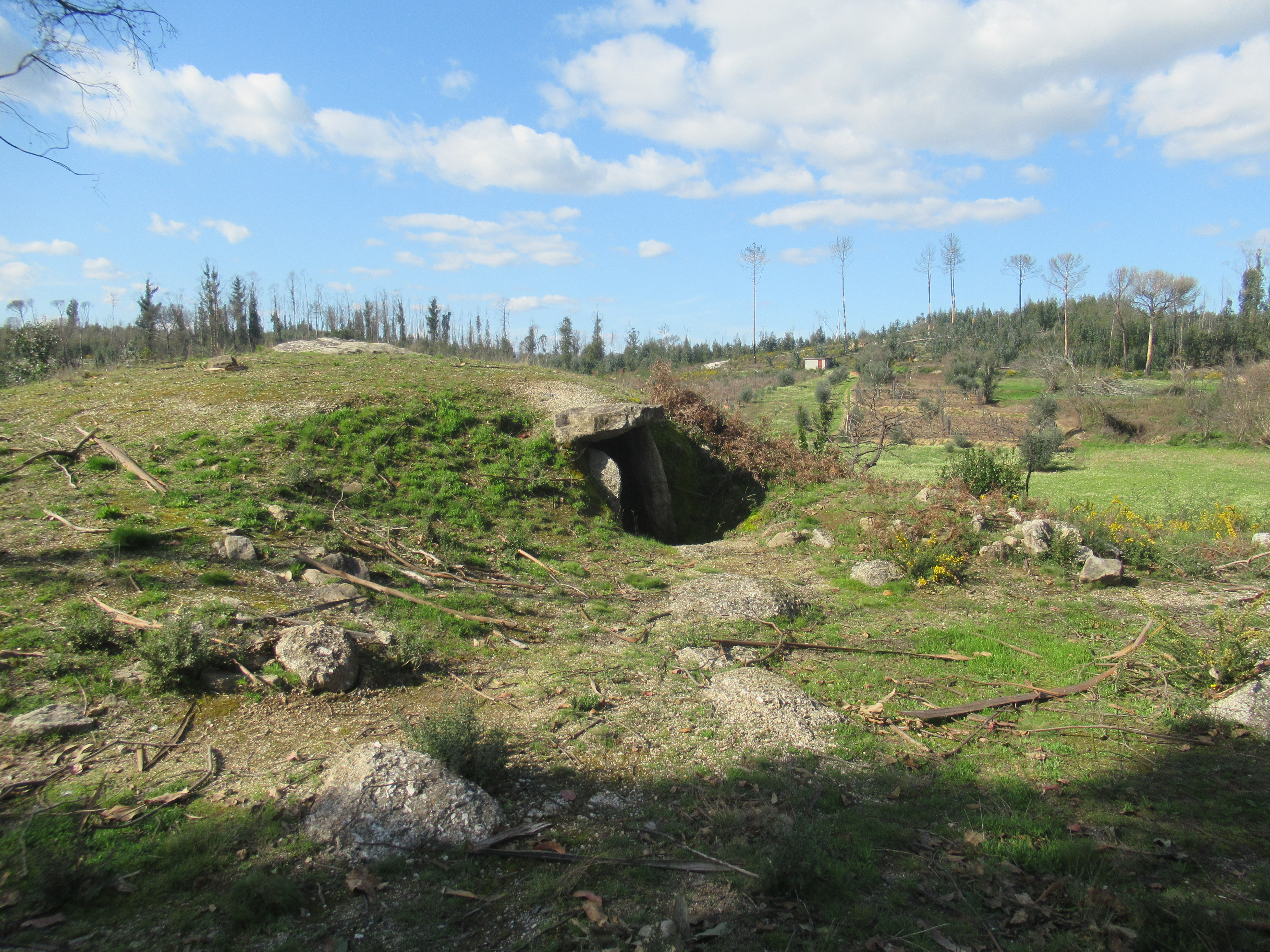 Anta da Arquinha da Moura em Tondela, Portugal, com Mamoa (cobertura em terra) intacta.